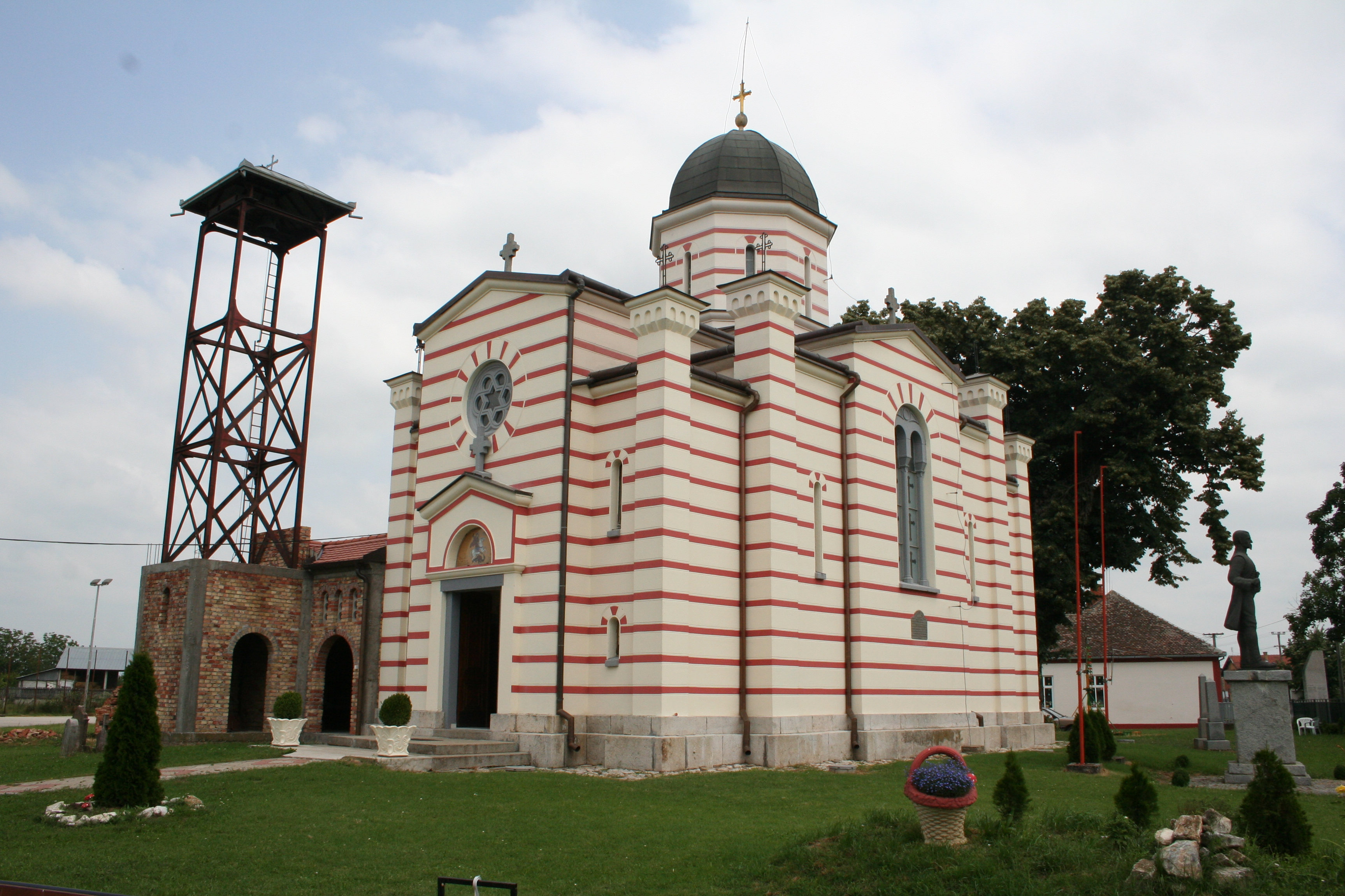 Crkva Sv. Georgija, Salaš Noćajski